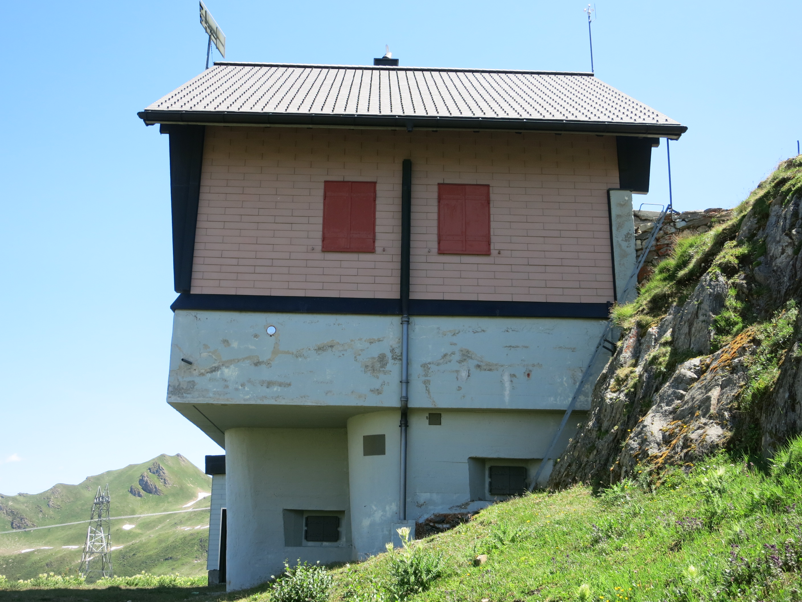 Infanteriewerk San Giacomo, Bedretto TI, Schweiz